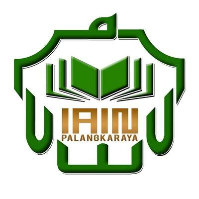 Logo IAIN Palangka Raya